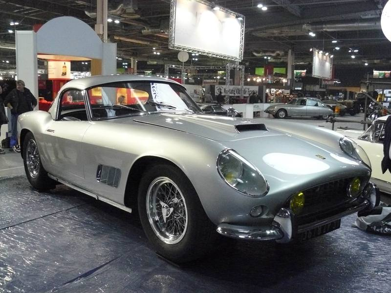 Retromobile 2012